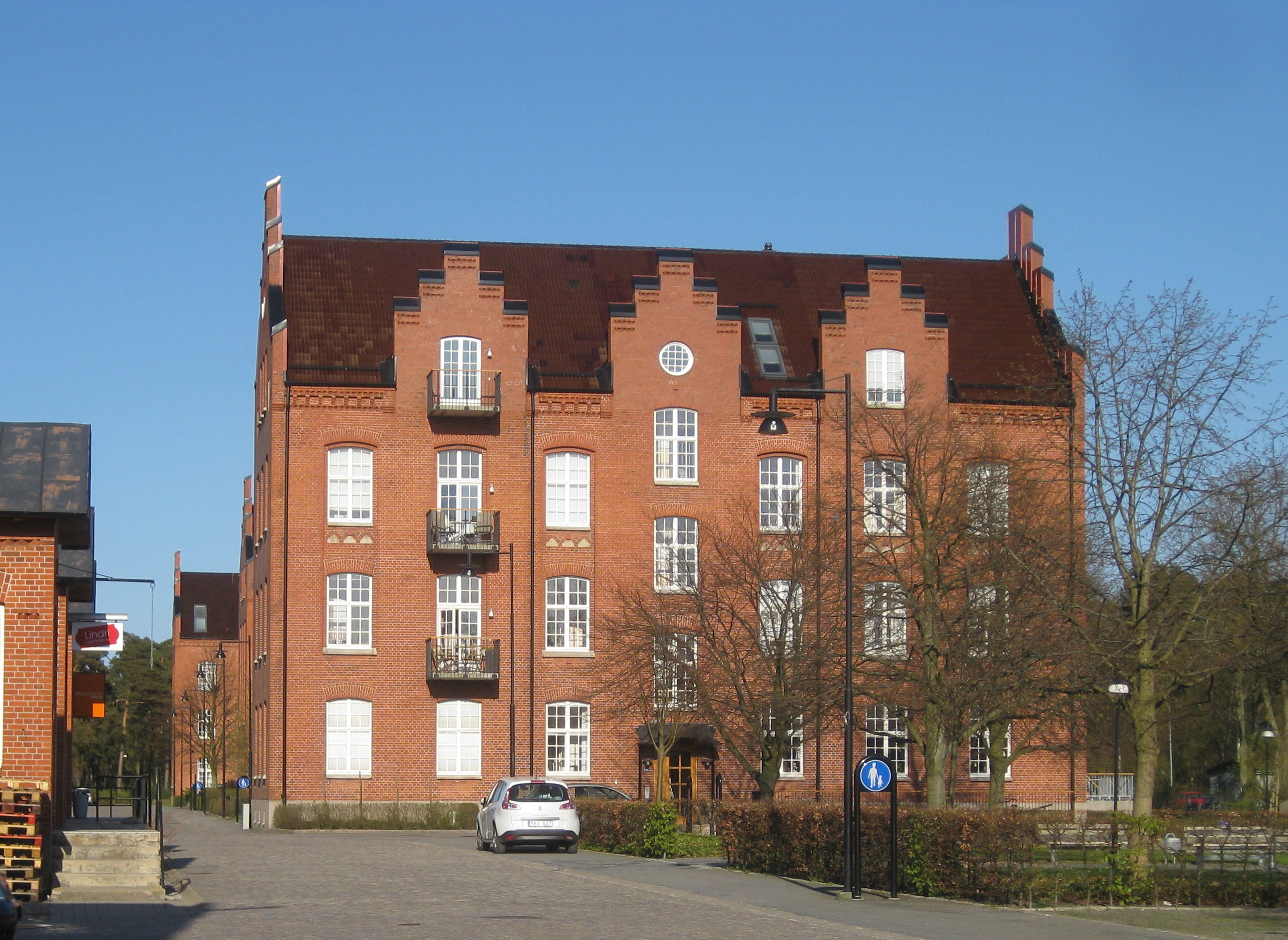 Regementsbyggnad i Ystad. Ursprungligen logement, numera bostäder.